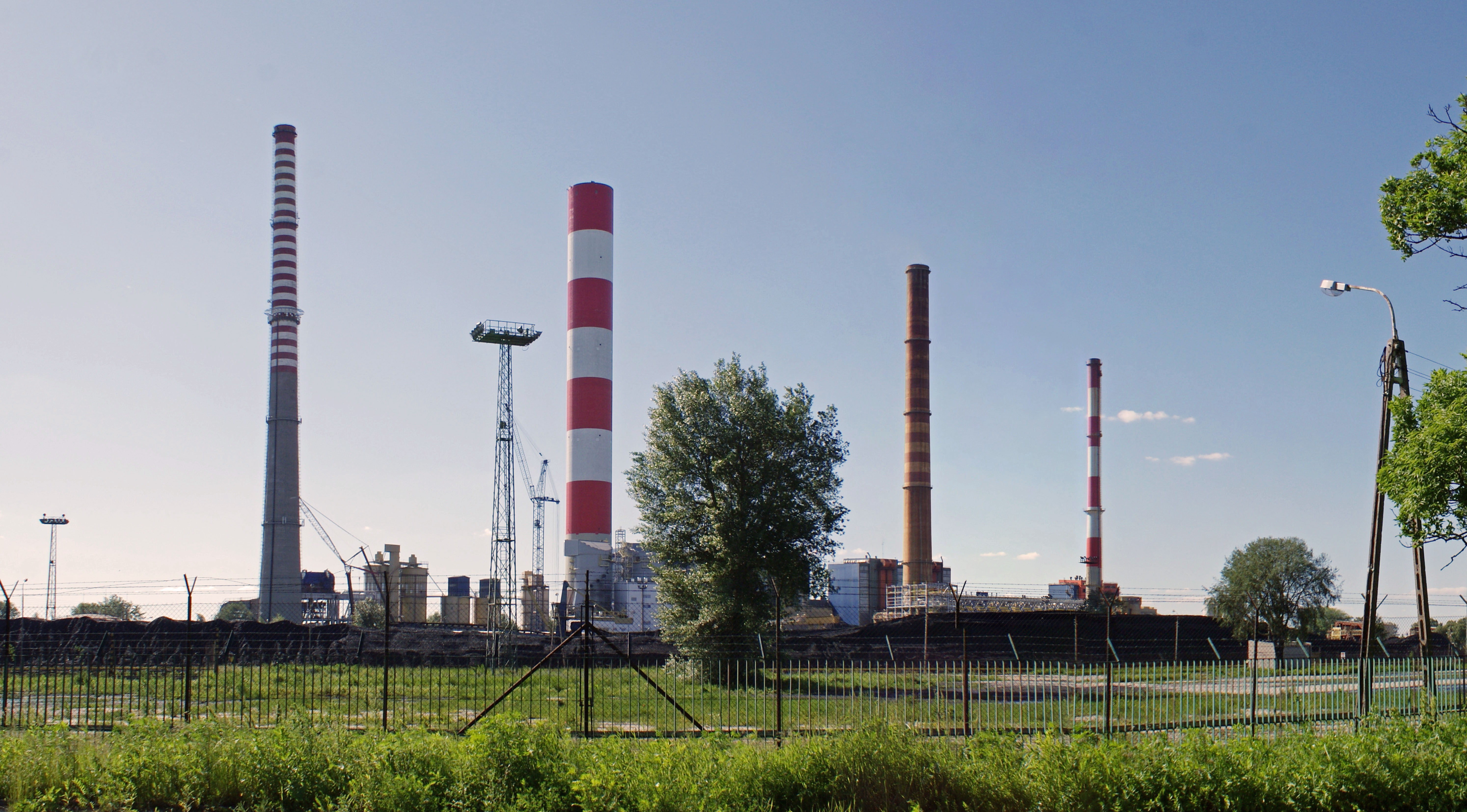 Tyły Elektrociepłowni Siekierki w Warszawie